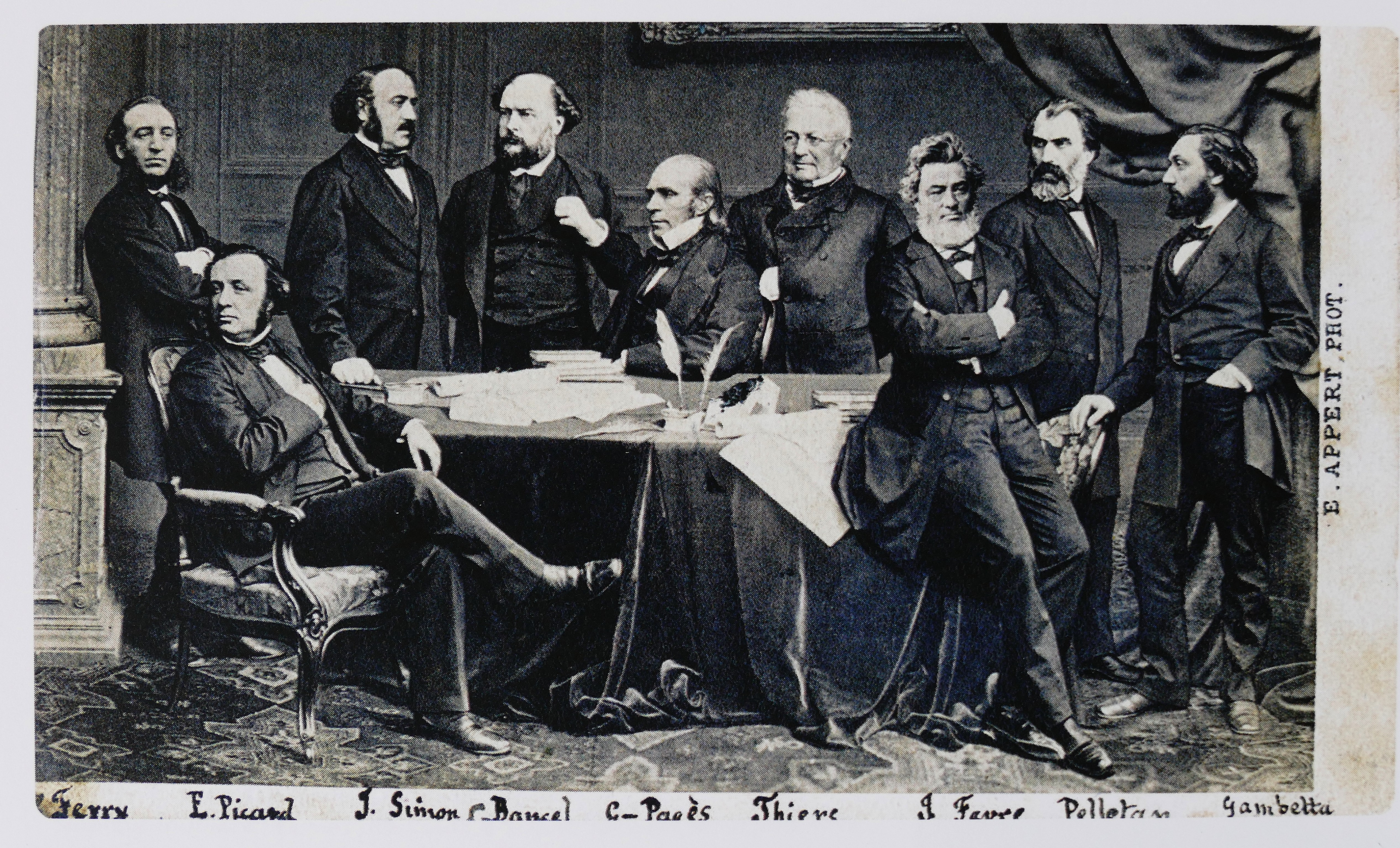 Le gouvernement provisoire d'Adolphe Thiers 1870-1871. Photo (montage) d'Ernest-Eugène Appert, noms manuscrits.